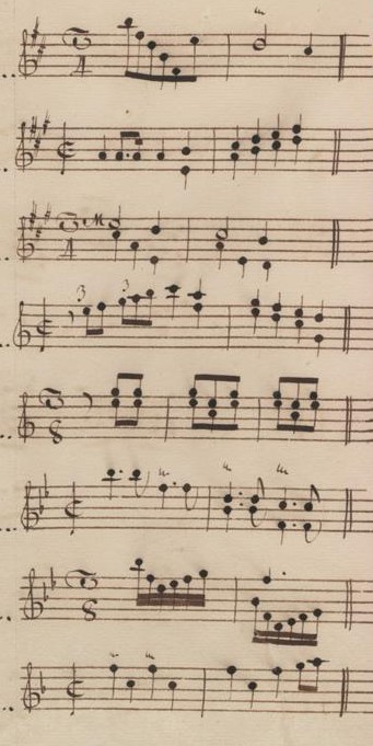 Table du volume XII des manuscrits de Venise (incipit des sonates 15 à 22, K. 498-505).